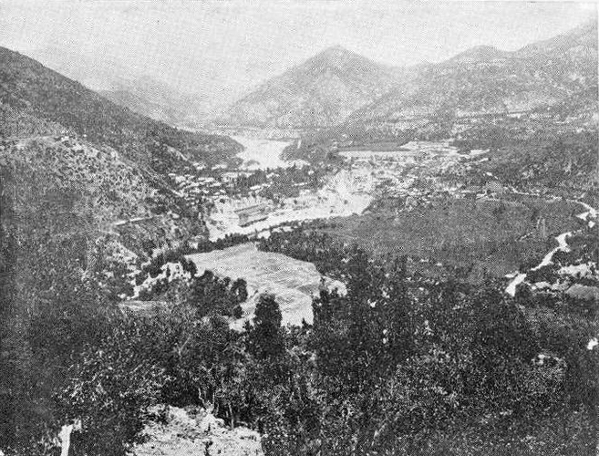 Valle del río Cachapoal. En el centro se ve la usina hidroeléctrica y la villa de Coya.